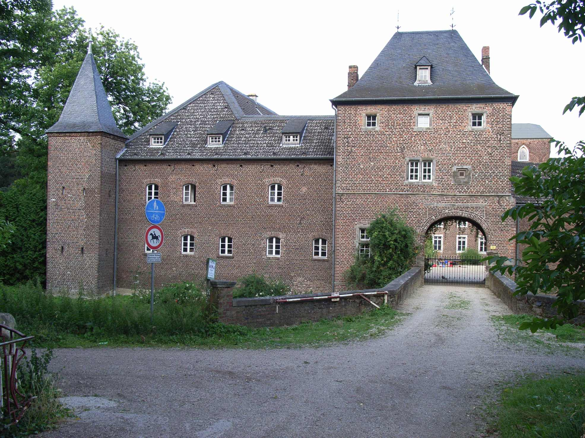 Schloss Kellenerg, Jülich-Barmen